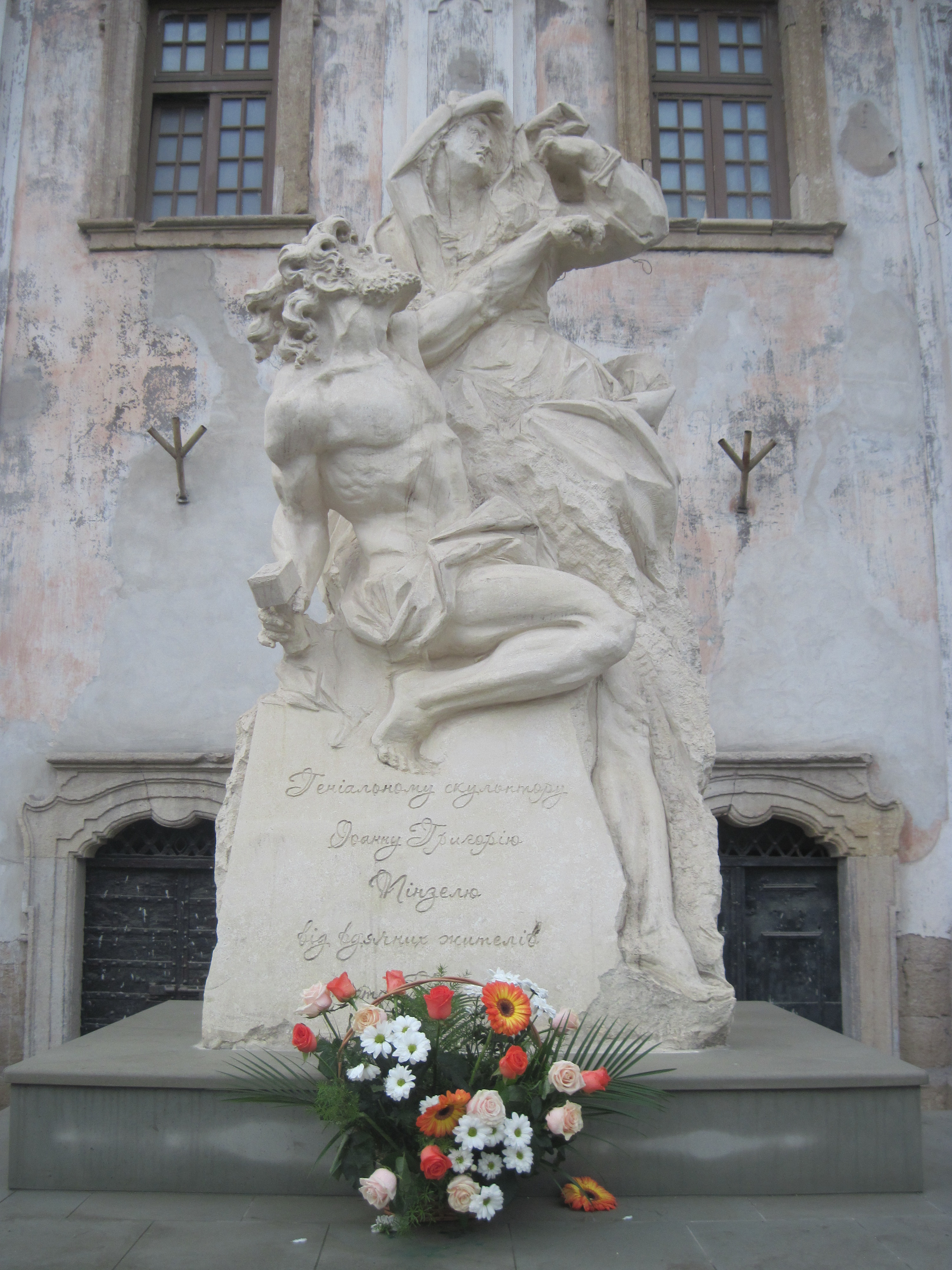 Памятник І. Г. Пінзель, Бучач, 2014